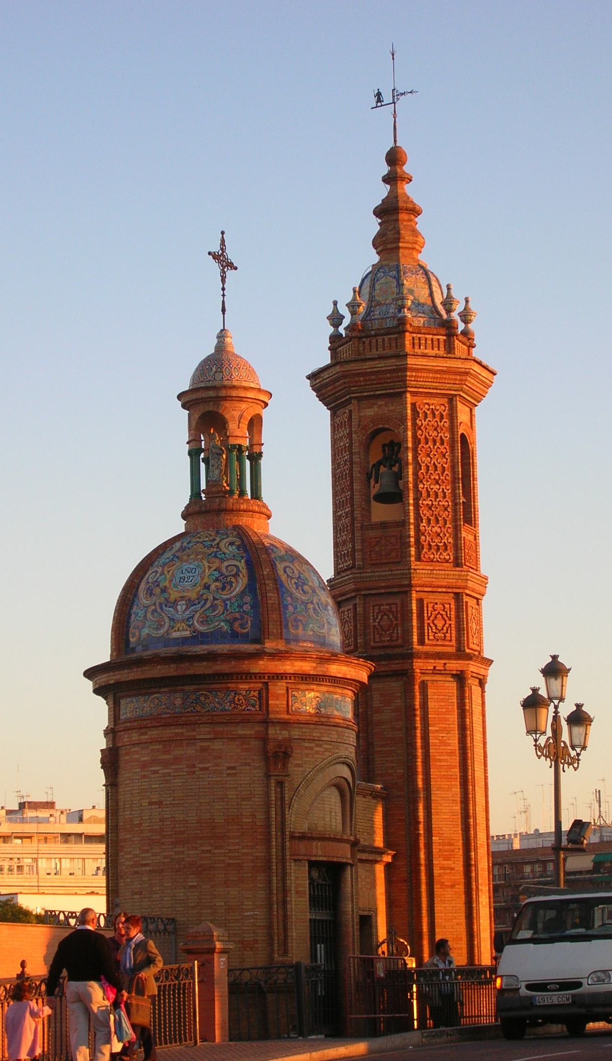 Capilla del Carmen (1928), que sustituye a la del mismo nombre derribada en 1918, es de estilo neomudejar, obra de Anibal González Álvarez-Ossorio, situada en el puente de Triana